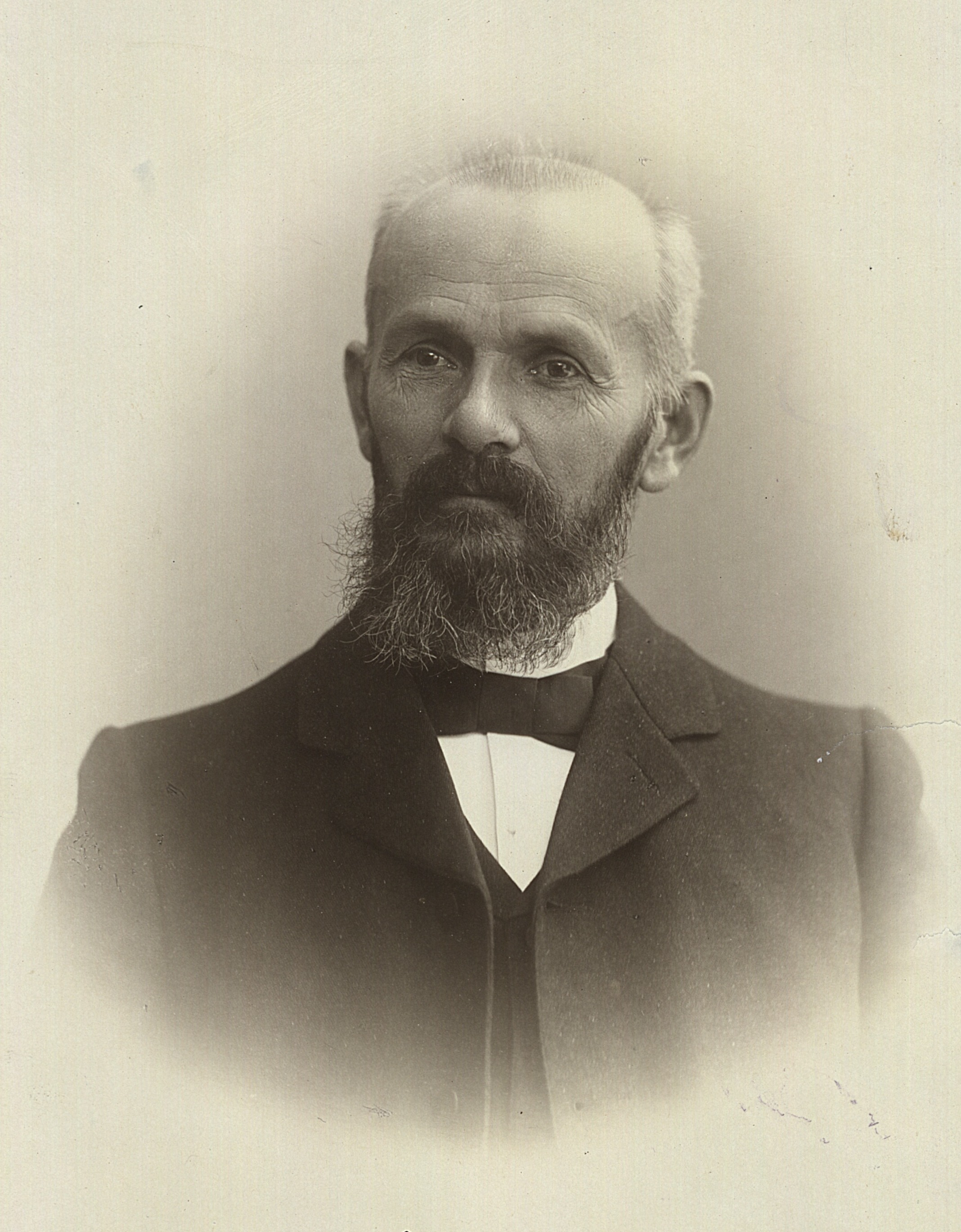 Mit Autograph